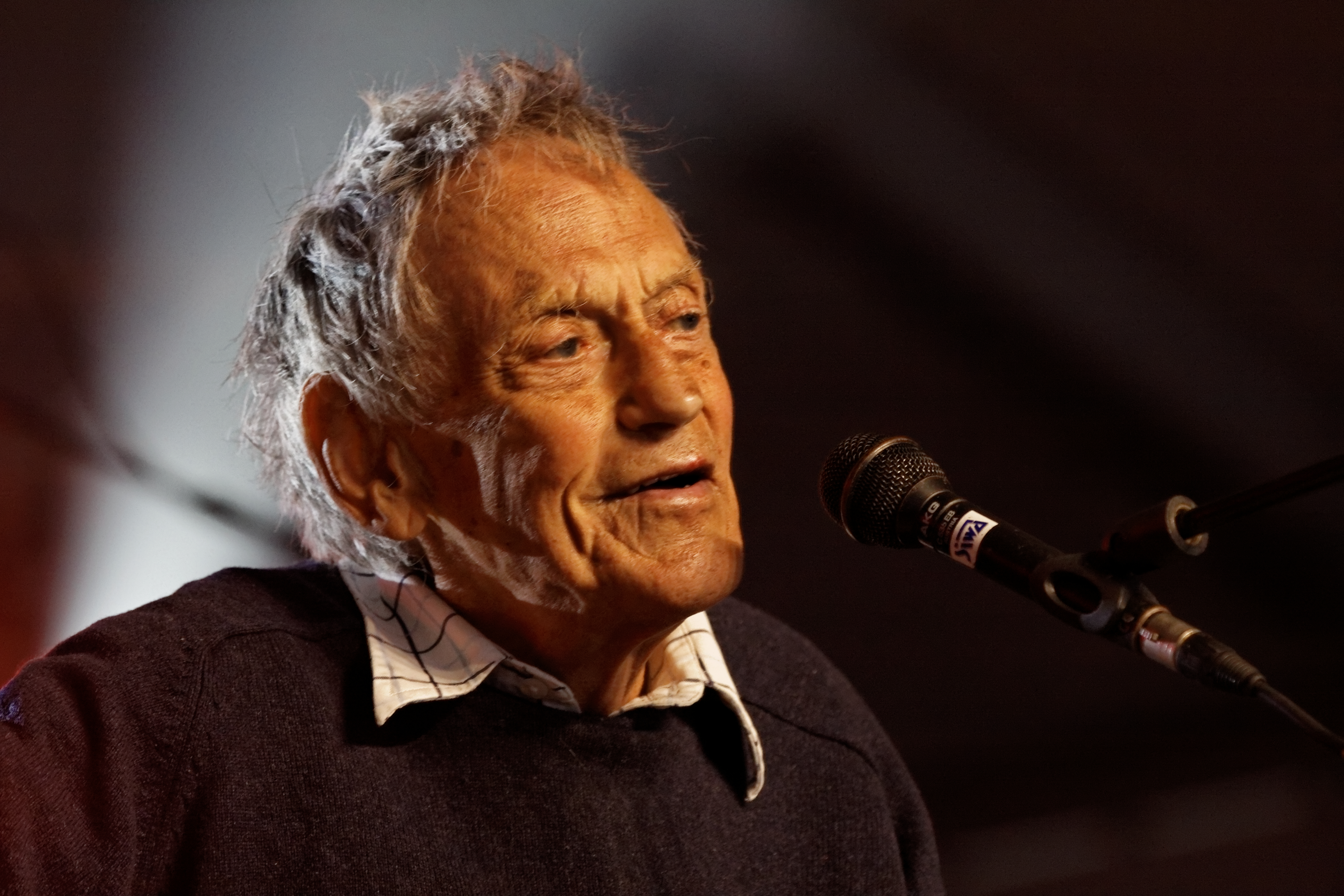 Graeme Allwright en concert à l'espace évêché lors du festival de Cornouaille 2012.